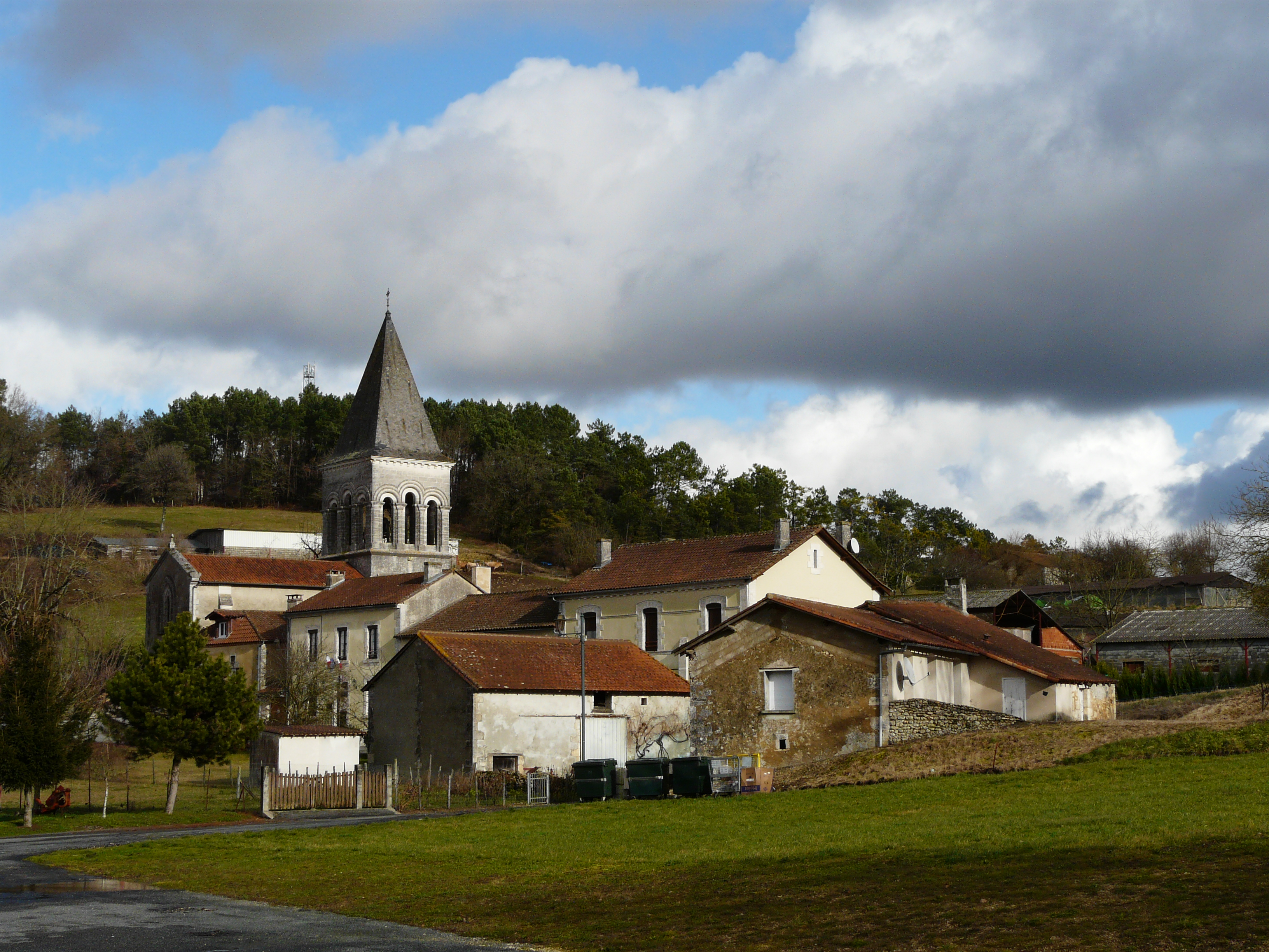 Le bourg d'Eyvirat, Dordogne, France